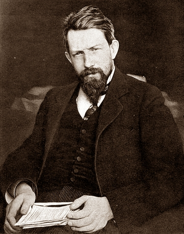 Русский философ, историк, экономист, политик и публицист Пётр Бернгардович Струве (1870-1944)